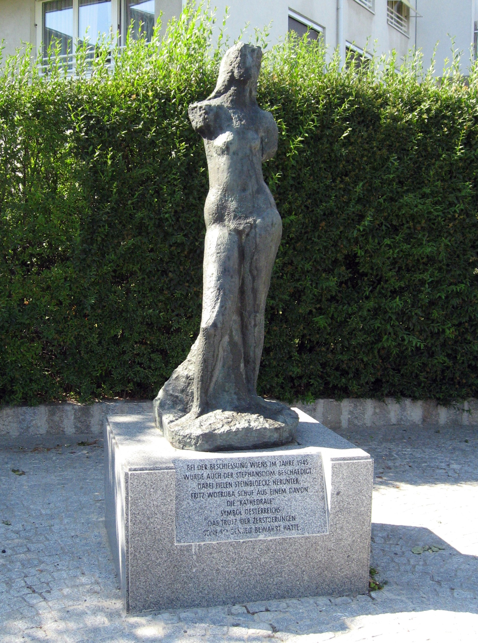 Denkmal "Kathedrale" von Fritz Wotruba in Wien, Donaustadt